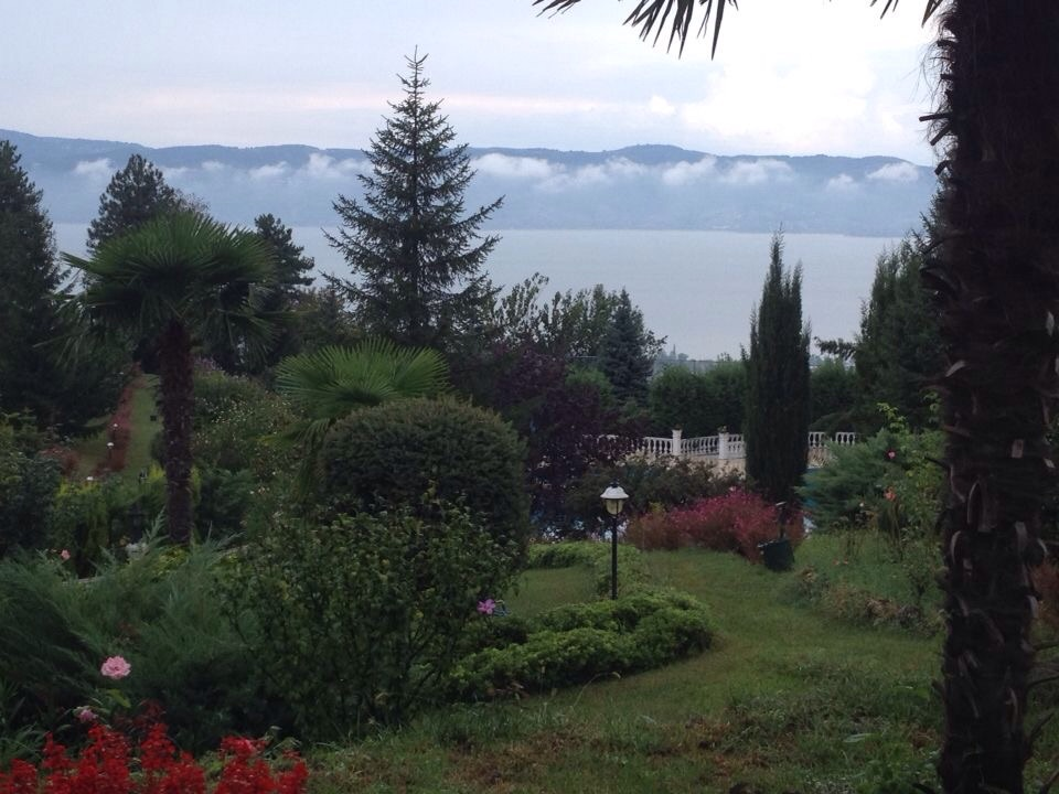 سبانجا او صبنجة